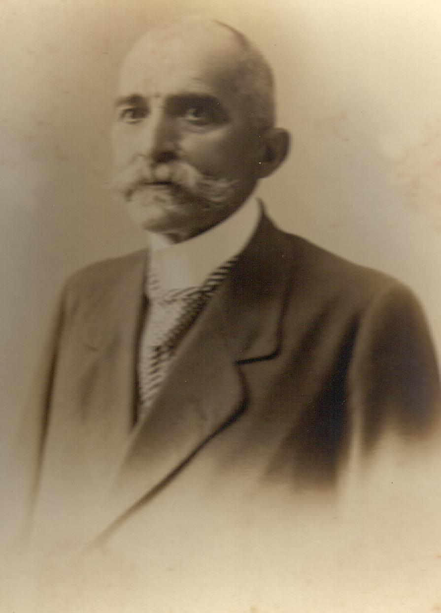 Foto digitalizada de original de 1910.